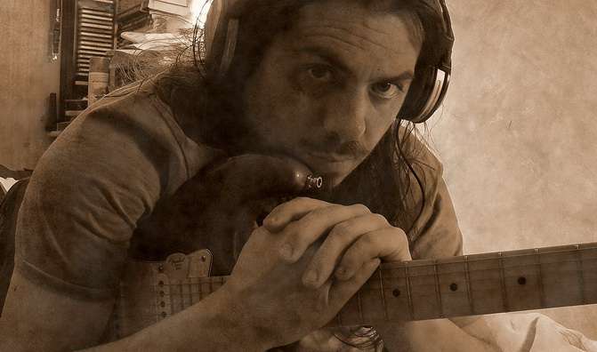 Lubay, dj lubay, właśc. Michał Piotr Maksymilian Lubiszewski (ur. 1971 w Warszawie) – polski muzyk, producent muzyczny, DJ, tłumacz, scenarzysta, grafik, redaktor i twórca multimedialny.